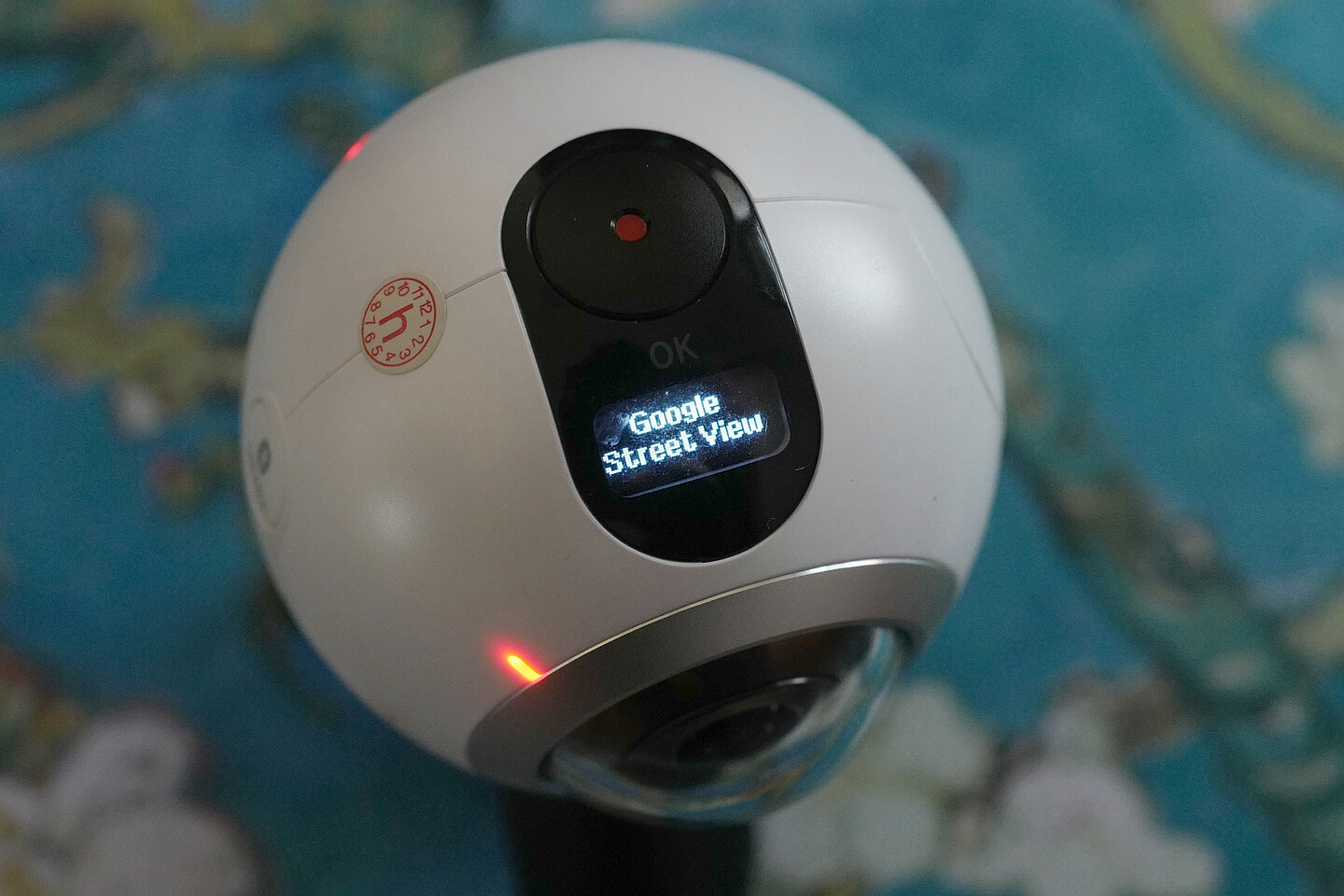 三星Gear360，顶部OLED显示以Google Street View模式工作。